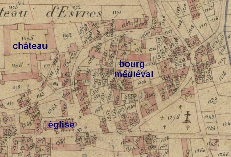 éléments du bourg médiéval d4esvres